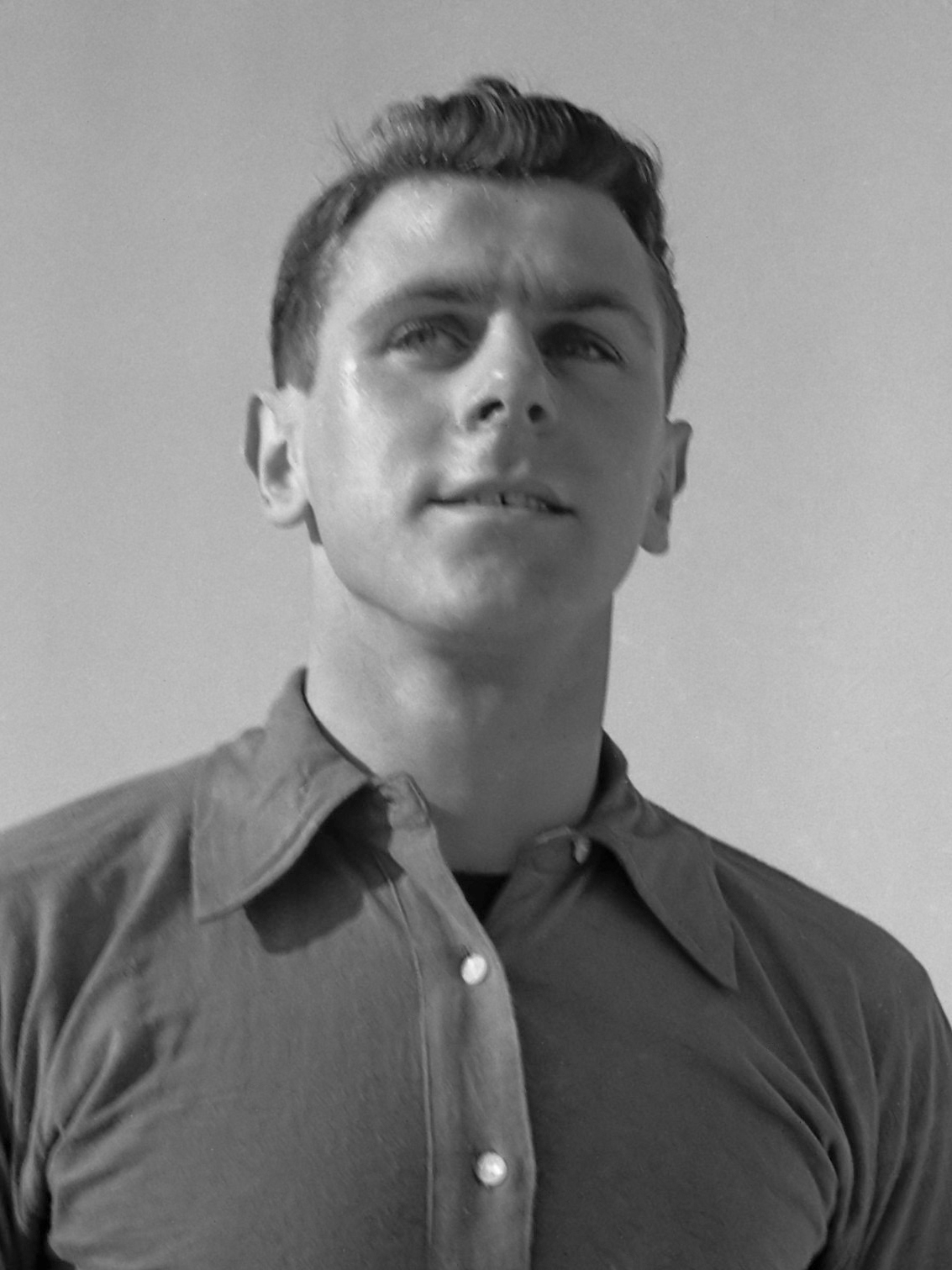 Voetballers debutanten Nederlands elftal . Koopal 1 maart 1956